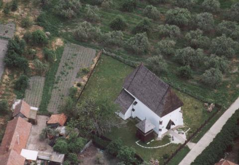 Szamosújlak, Hungary, aerialphotography